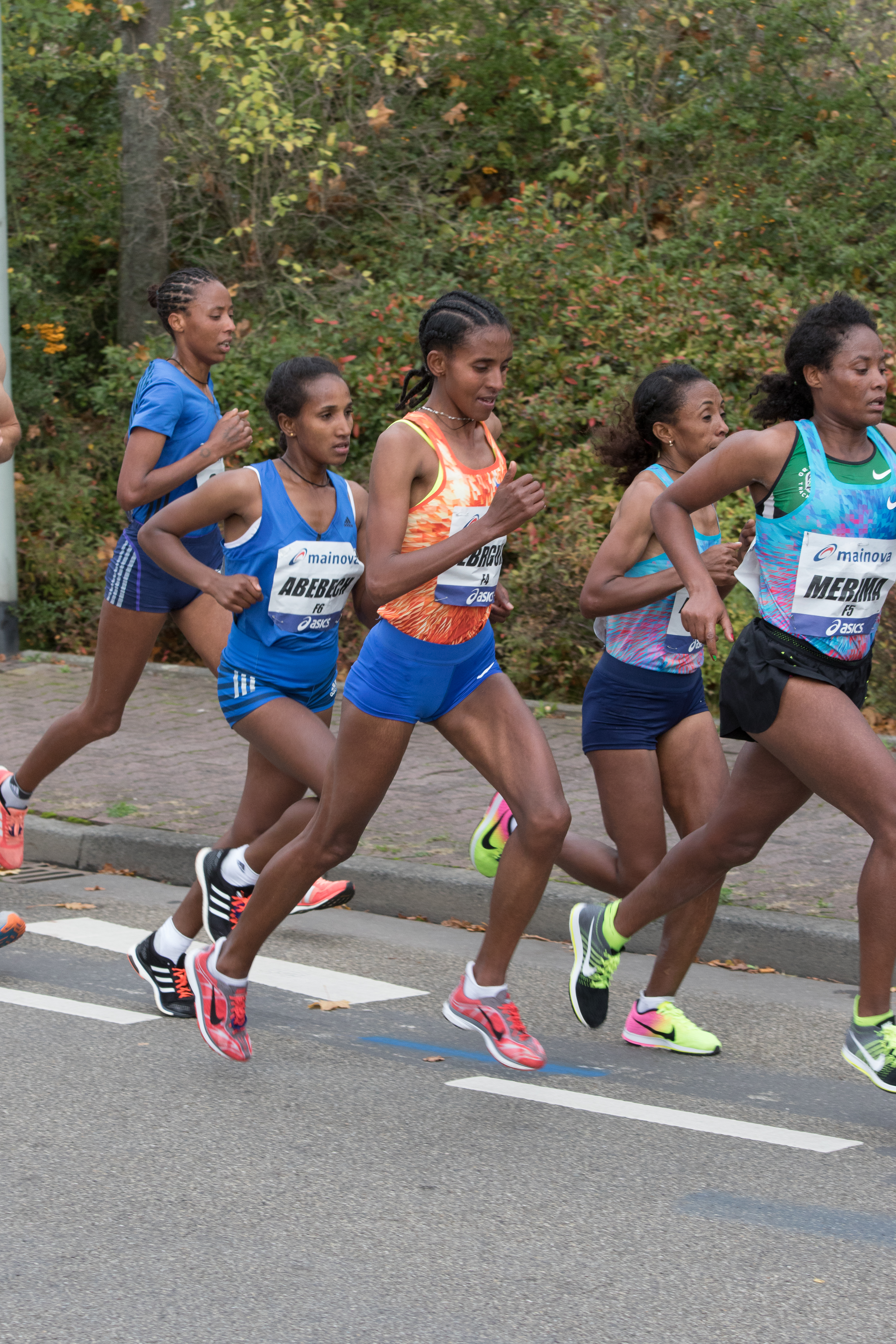 Abebech Afework Bekele, Yebrgual Melese, Meskerem Assefa, Merima Mohammed, Frankfurt Marathon 2017